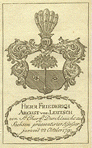 Wappen des Friedrich August von Leutsch (1757-1818) aus dem Jahr 1791.